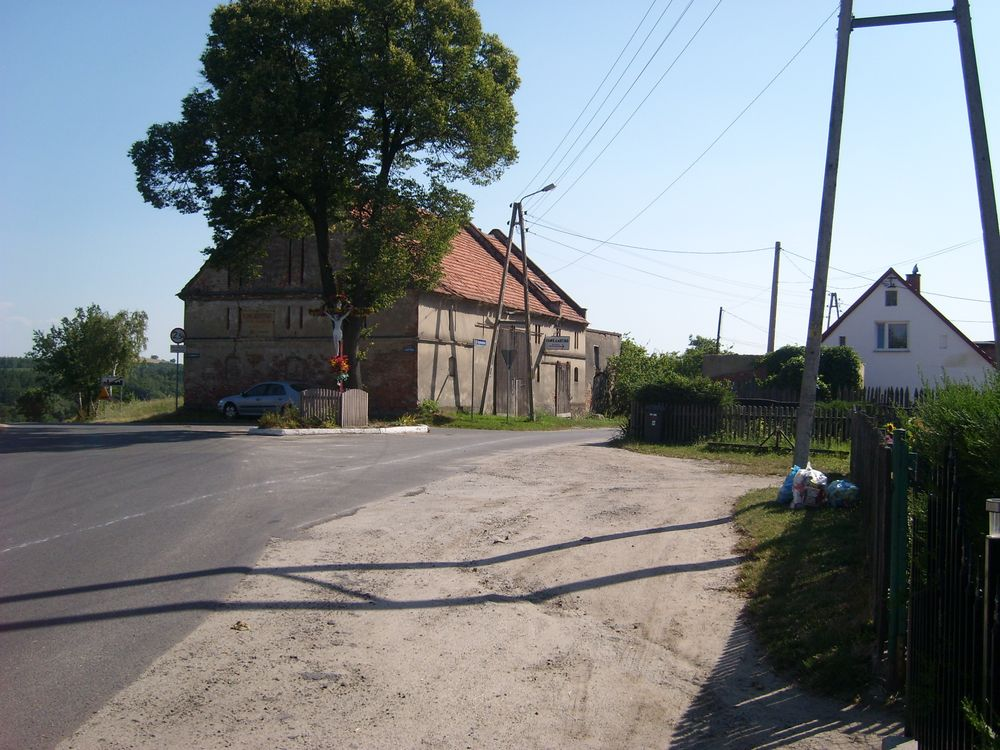 Zdjęcie dzielnicy Kopanica